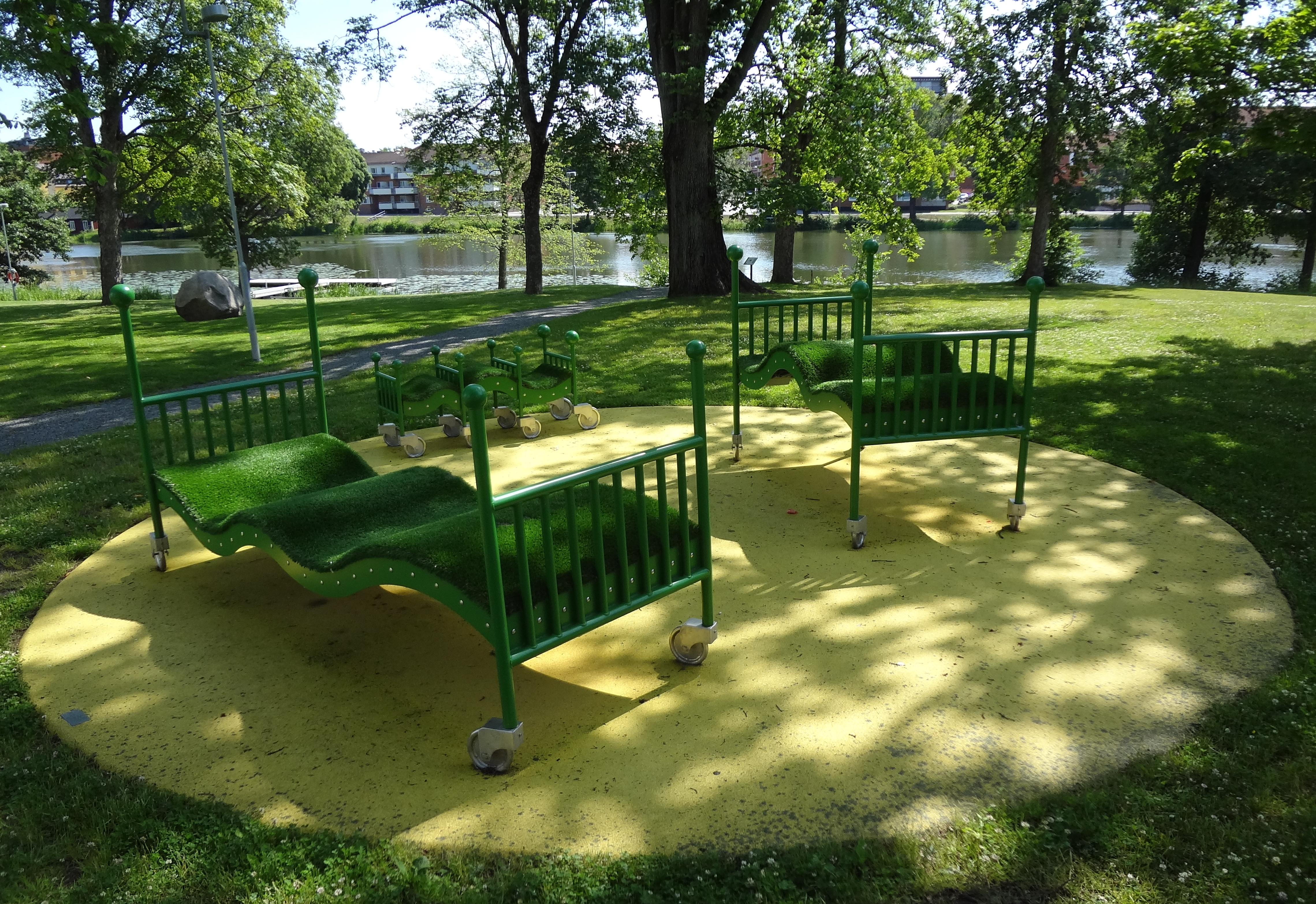 Drömmar, Annika Oskarsson, 2011, metall+konstgräs+gummi, i Eskilstuna.